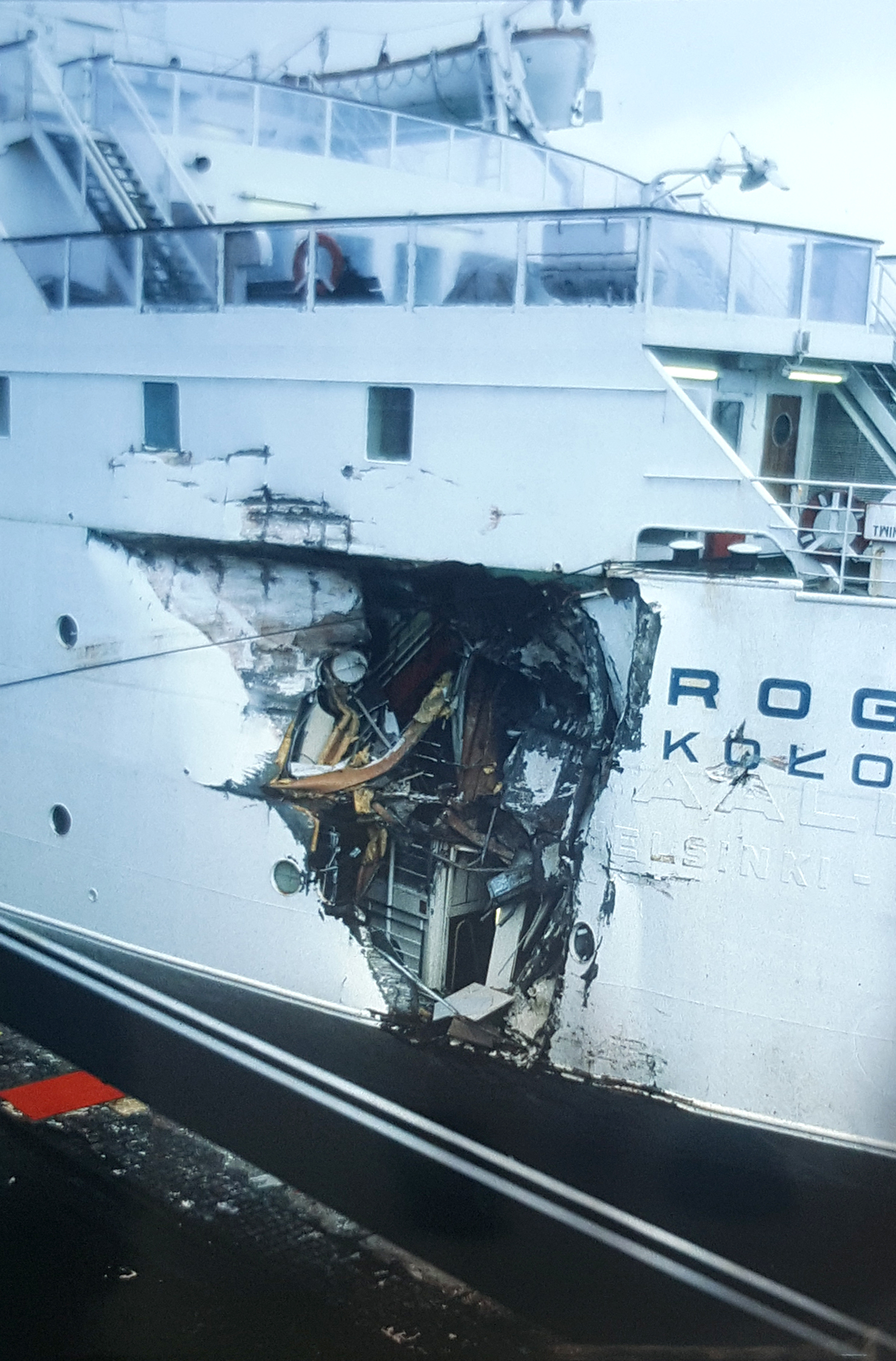 Im regulären Dienst von Helsinki nach Danzig unterwegs, kollodierte das polnische Fährschiff Rogalin im September 1979 mit dem niederländischen Tanker Coral Rubrum und erlitt Beschädigungen an der Steuerbordseite. Aufnahme im Hafen von Stockholm.